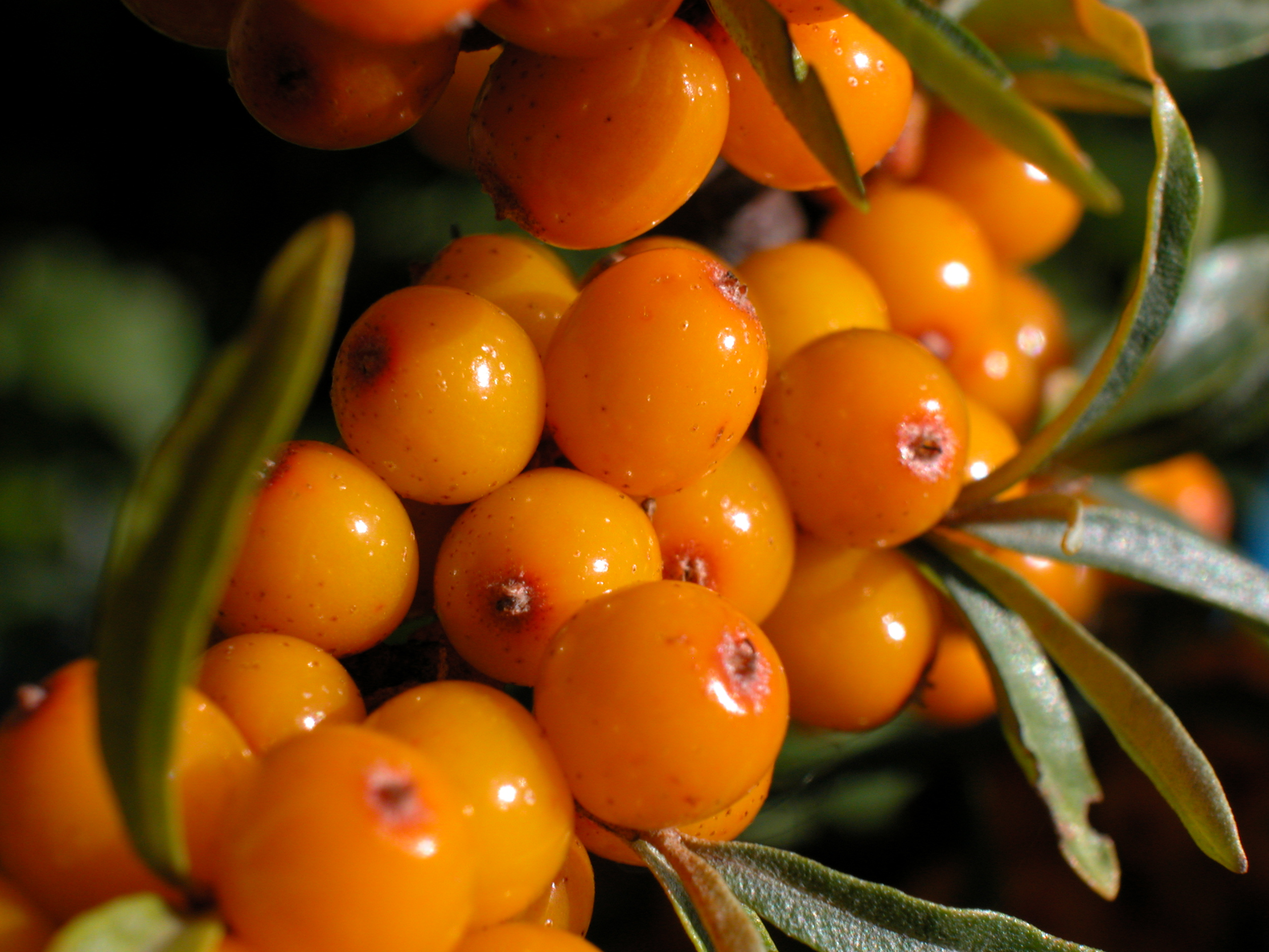 Плоды облепихи - Hippóphae rhamnoídes